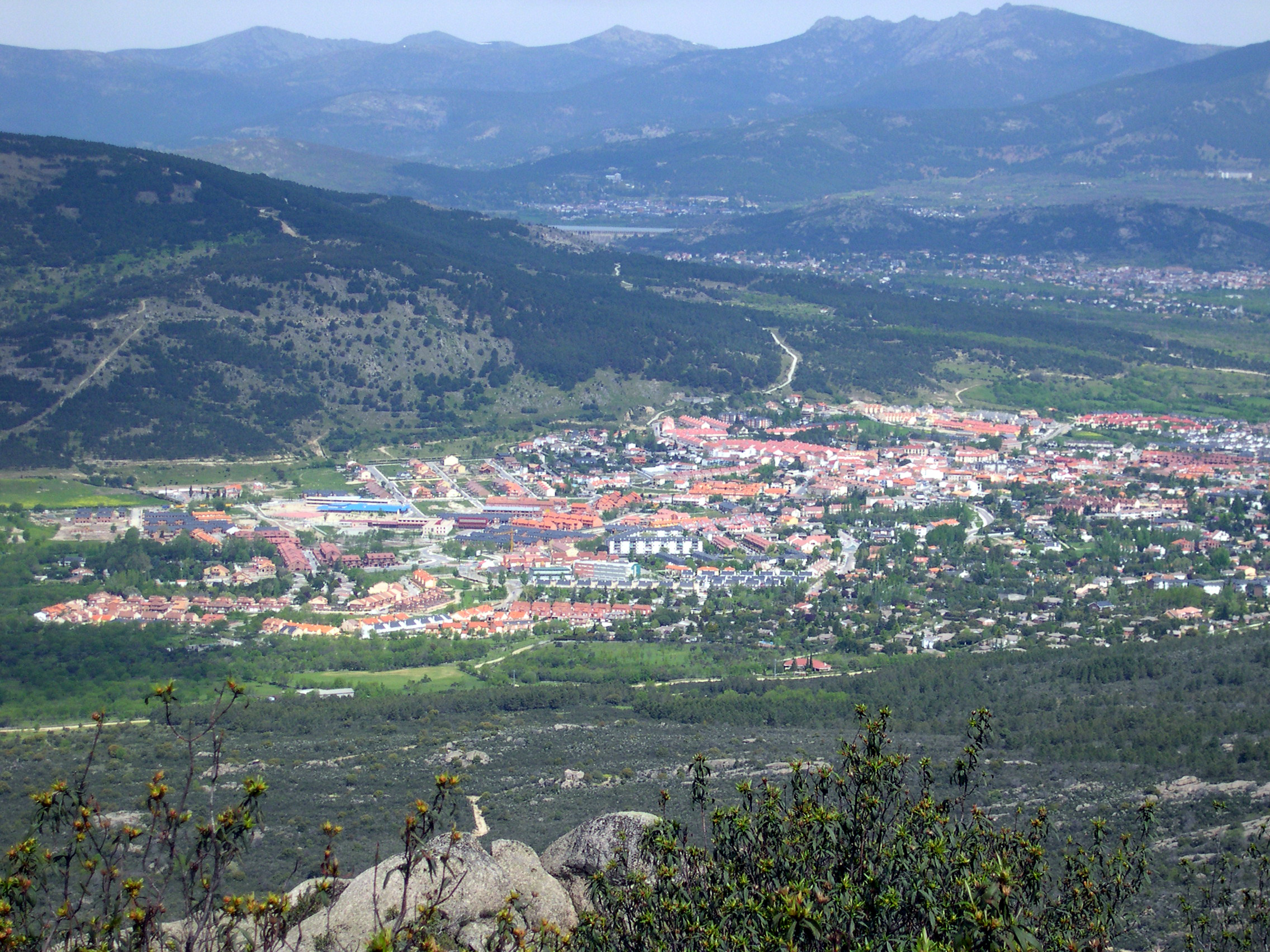 Vista parcial del pueblo de Moralzarzal, tomada desde Canto Hastial.